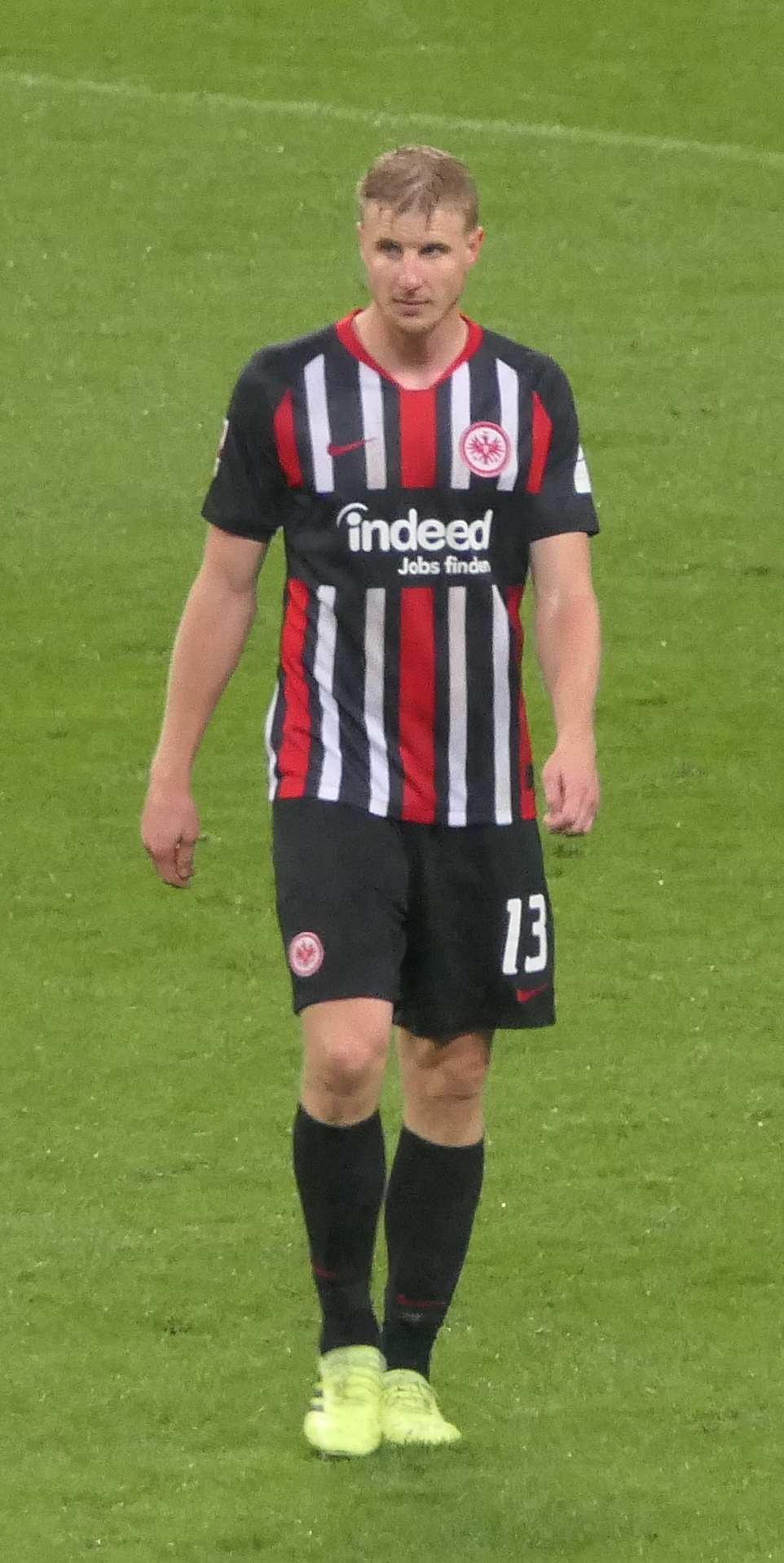 Der Fussballprofi Martin Hinteregger im Trikot von Eintracht Frankfurt beim Heimspiel gegen den SV Werder Bremen am 06.10.2019.